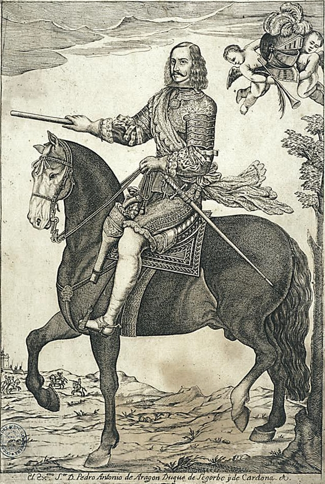 Retrato del militar y político español Pedro Antonio de Aragón, (Lucena, 1611 - Madrid, 1690)